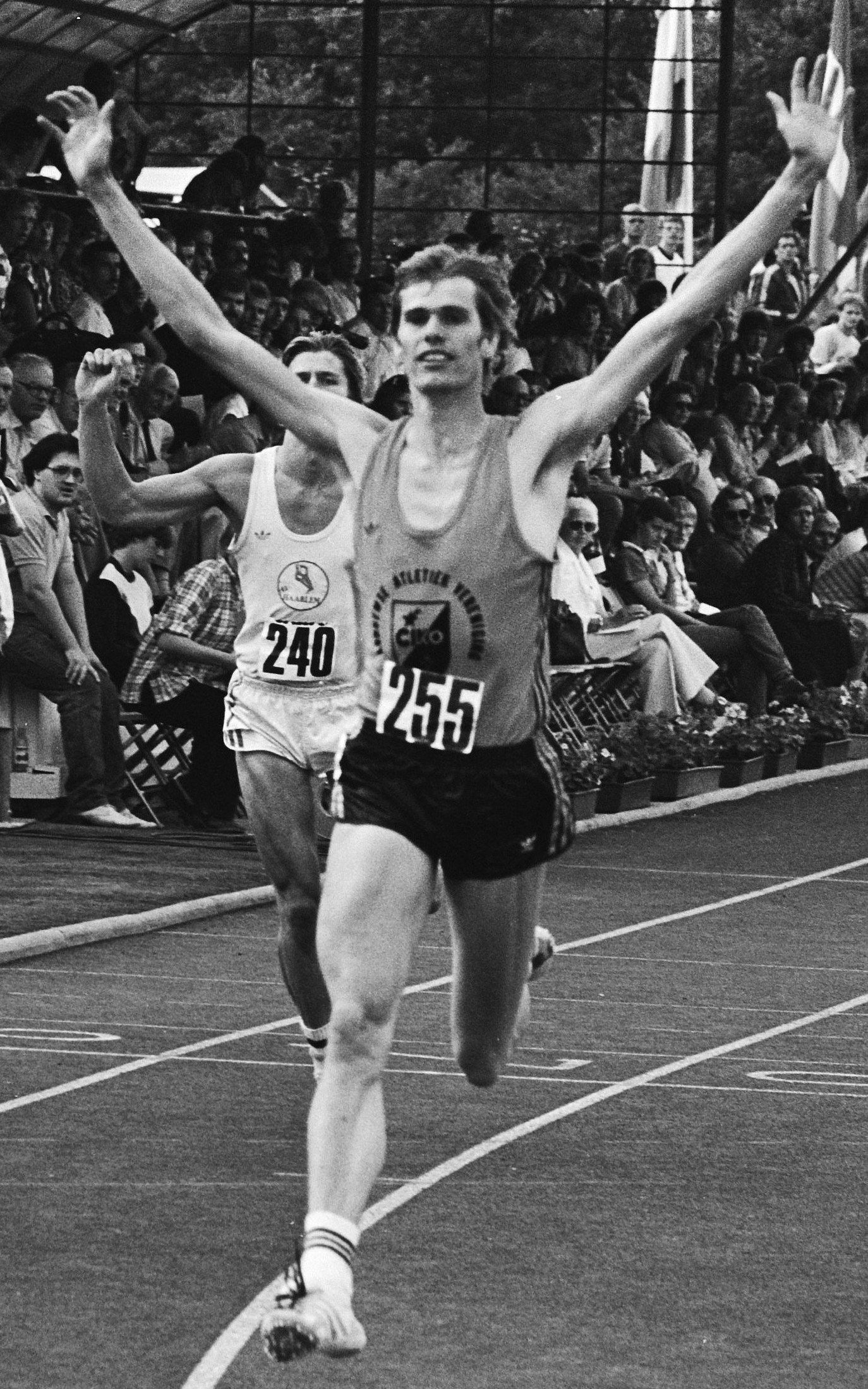 Nederlandse kampioenschappen atletiek, Sittard: Finish winnaar 200 meter, Henk Brouwer